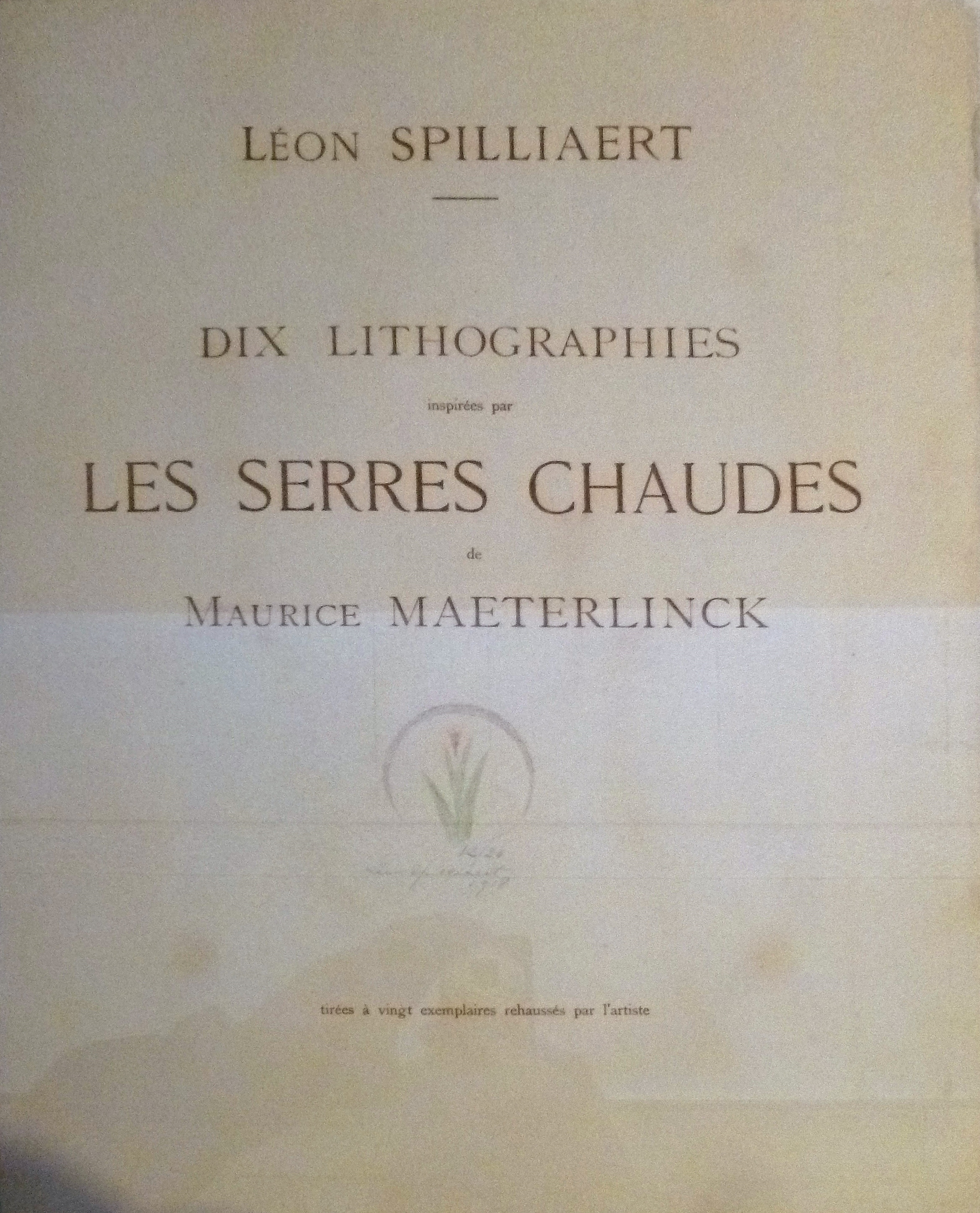 Les Serres Chaudes (1918) - titelblad- door Léon Spilliaert (1918); privéverzameling